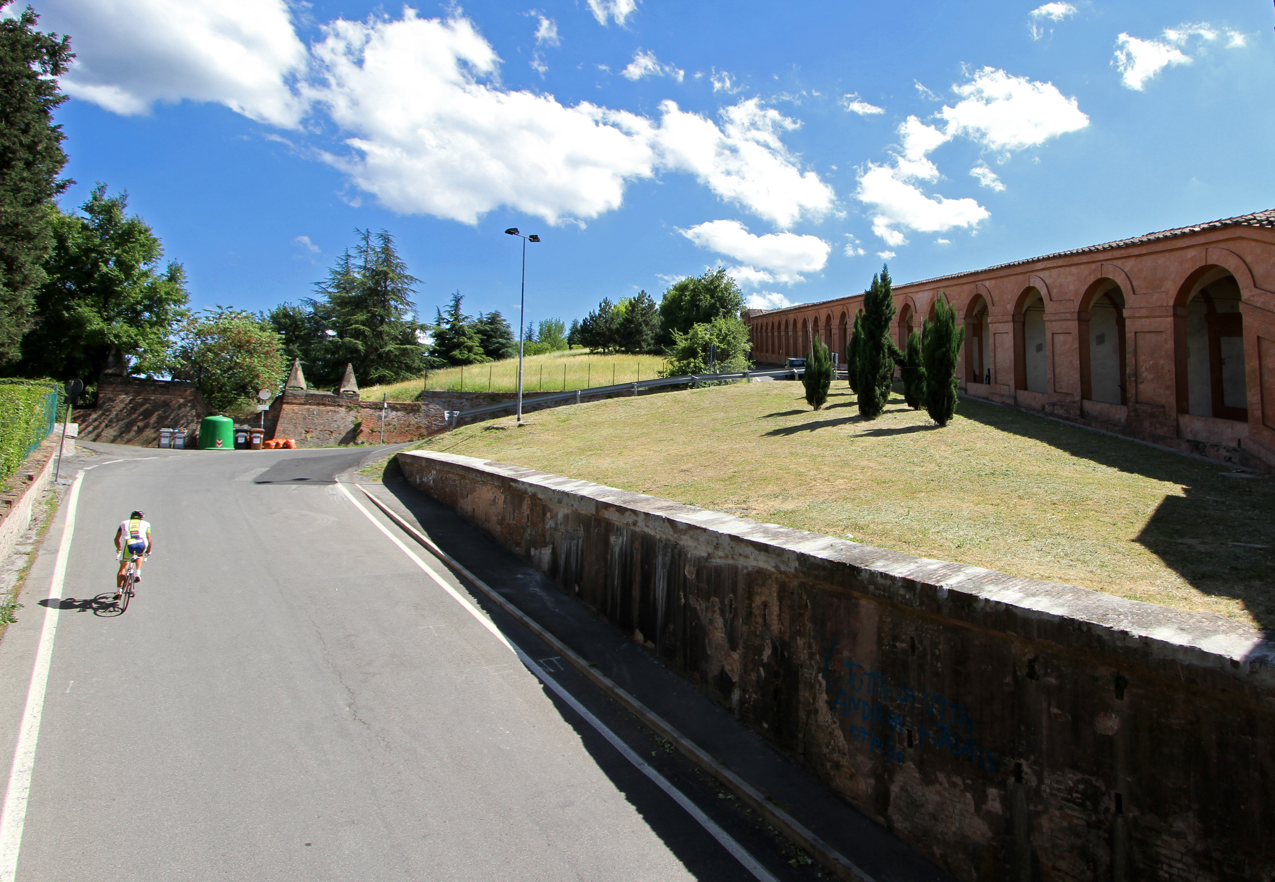 La famosa curva delle Orfanelle.